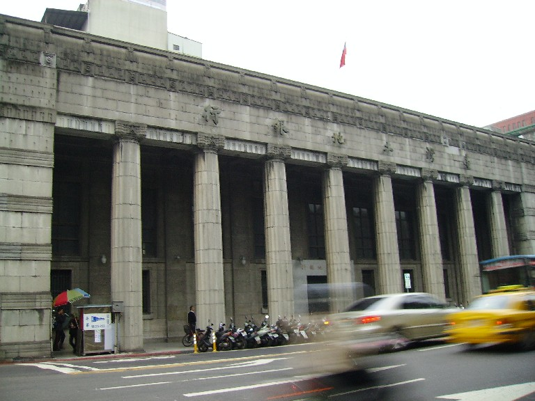 勸業銀行舊廈。